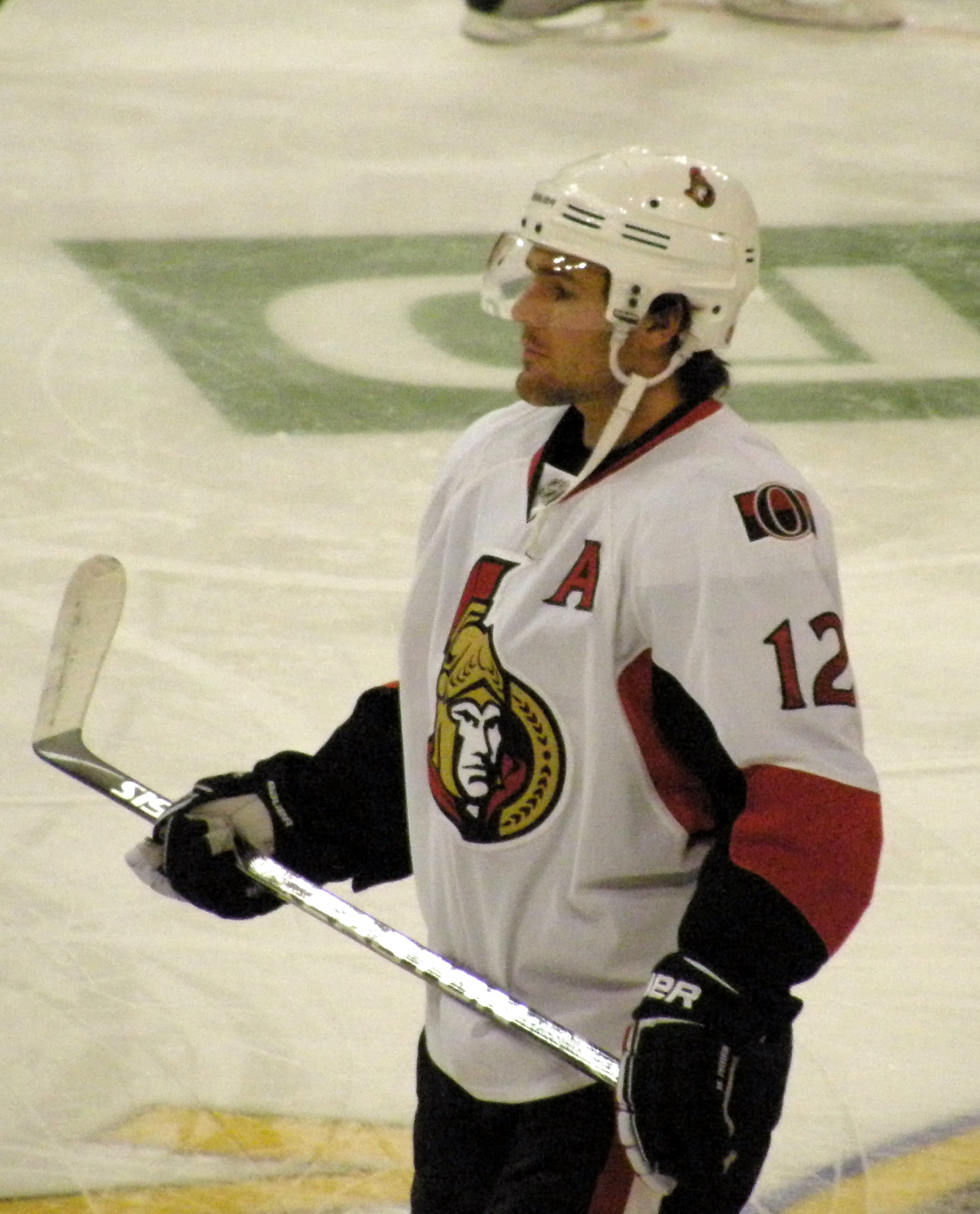 Mike Fisher (C, OTT)